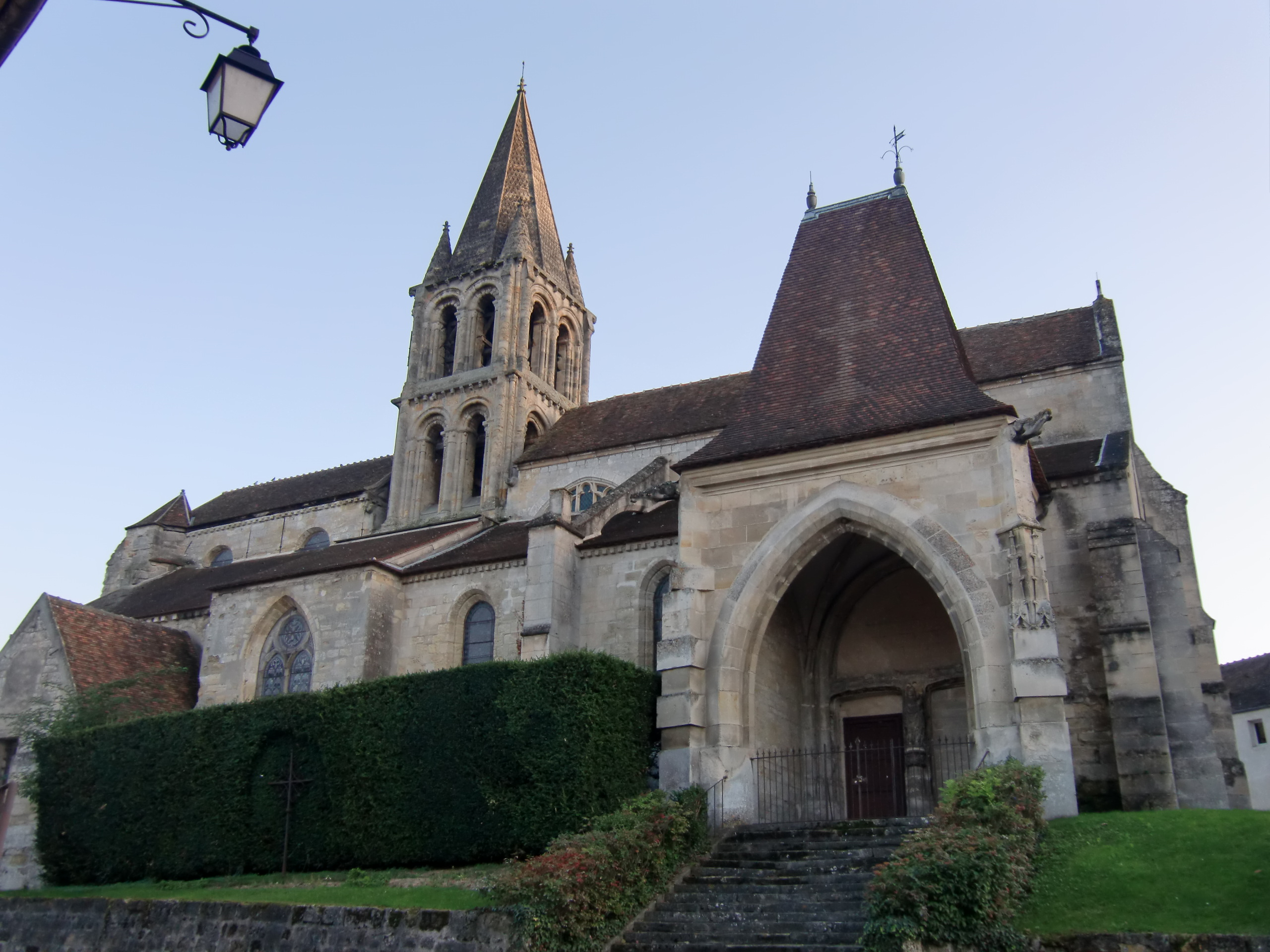 église de Jouy-le-Moutier (Val d'Oise, France)